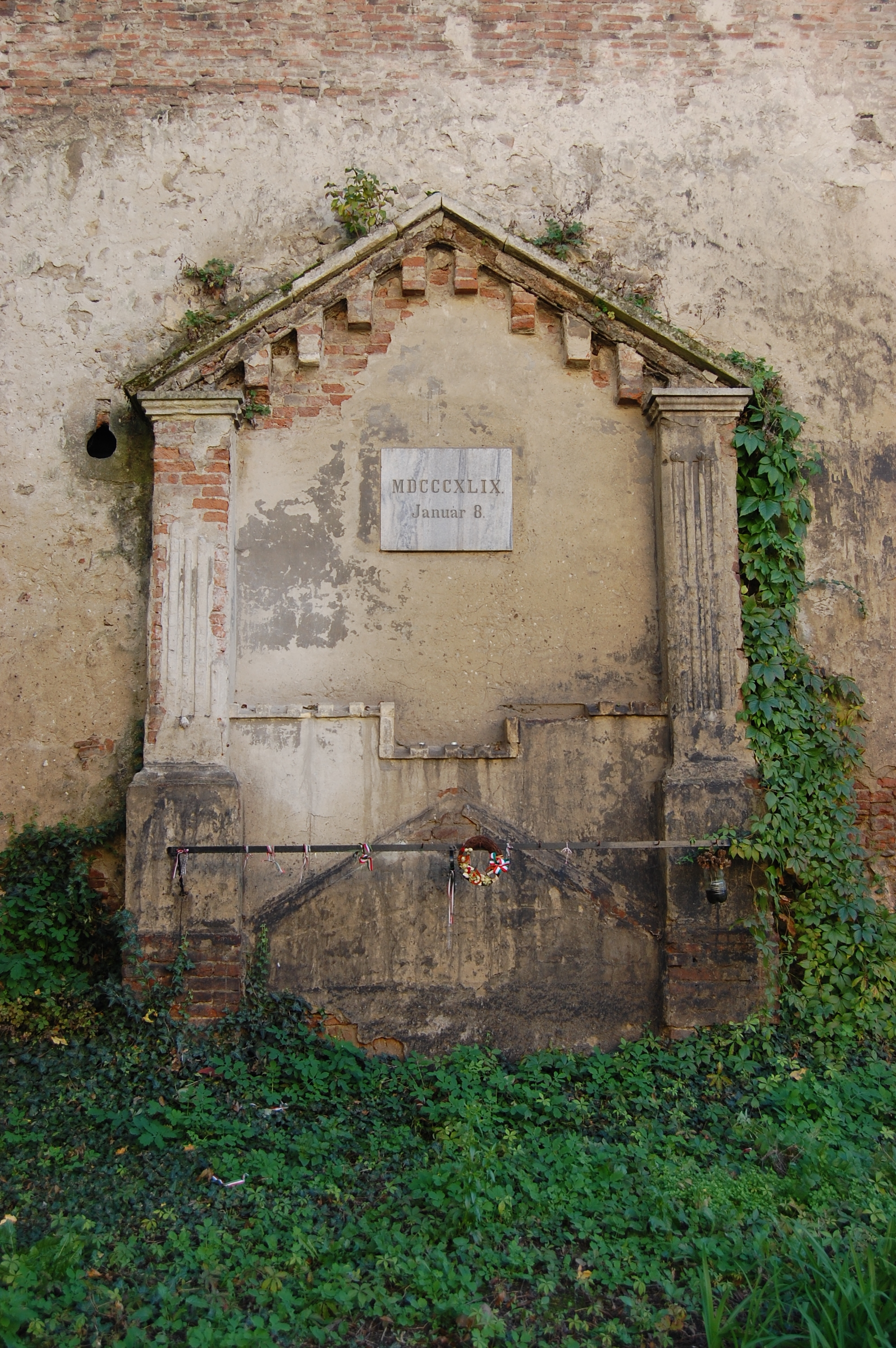 Nagyenyed - vár - MDCCCXLIX Január 8